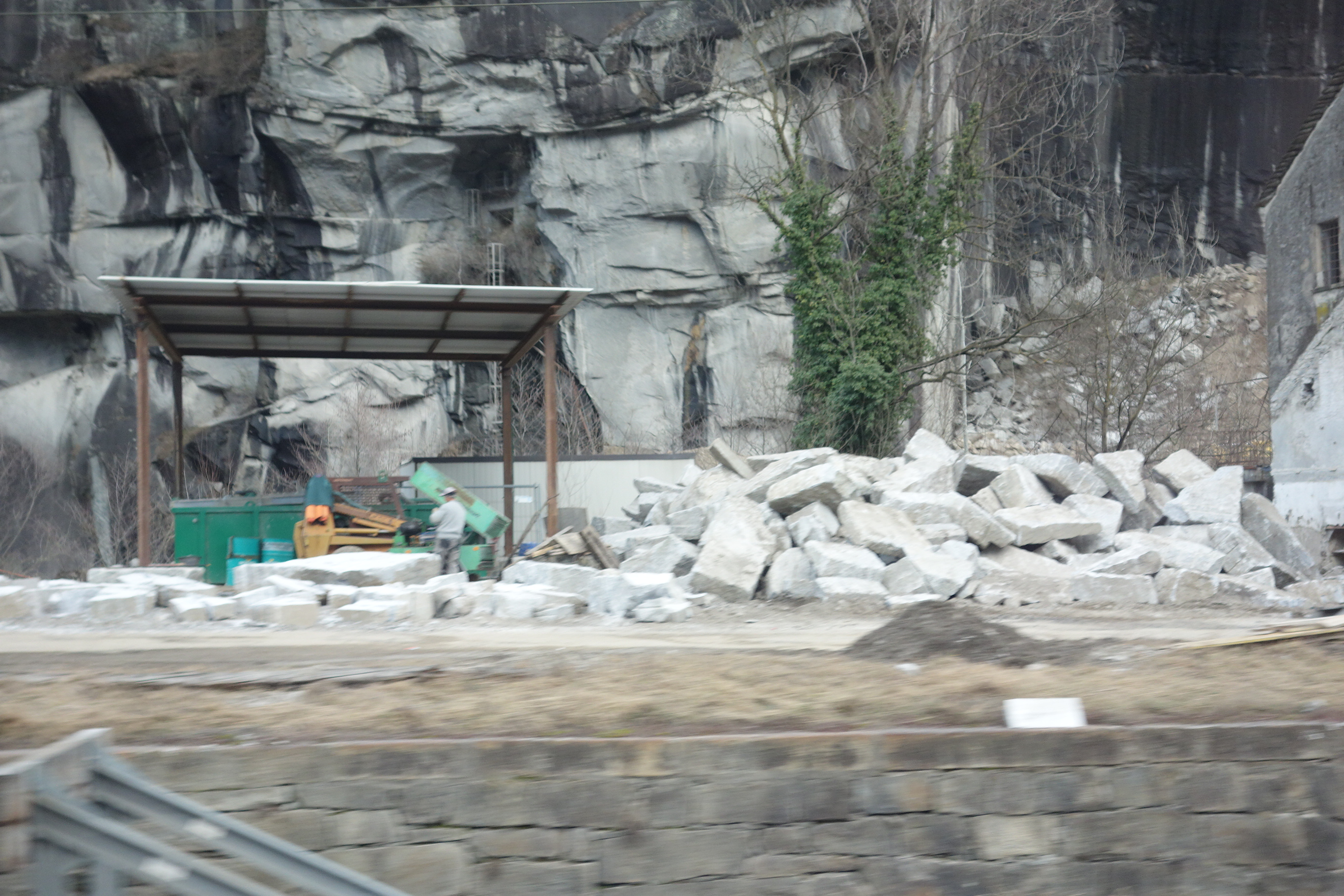 Infanteriebunker Cava Serta A 8131, Cresciano (Riviera) TI, Schweiz